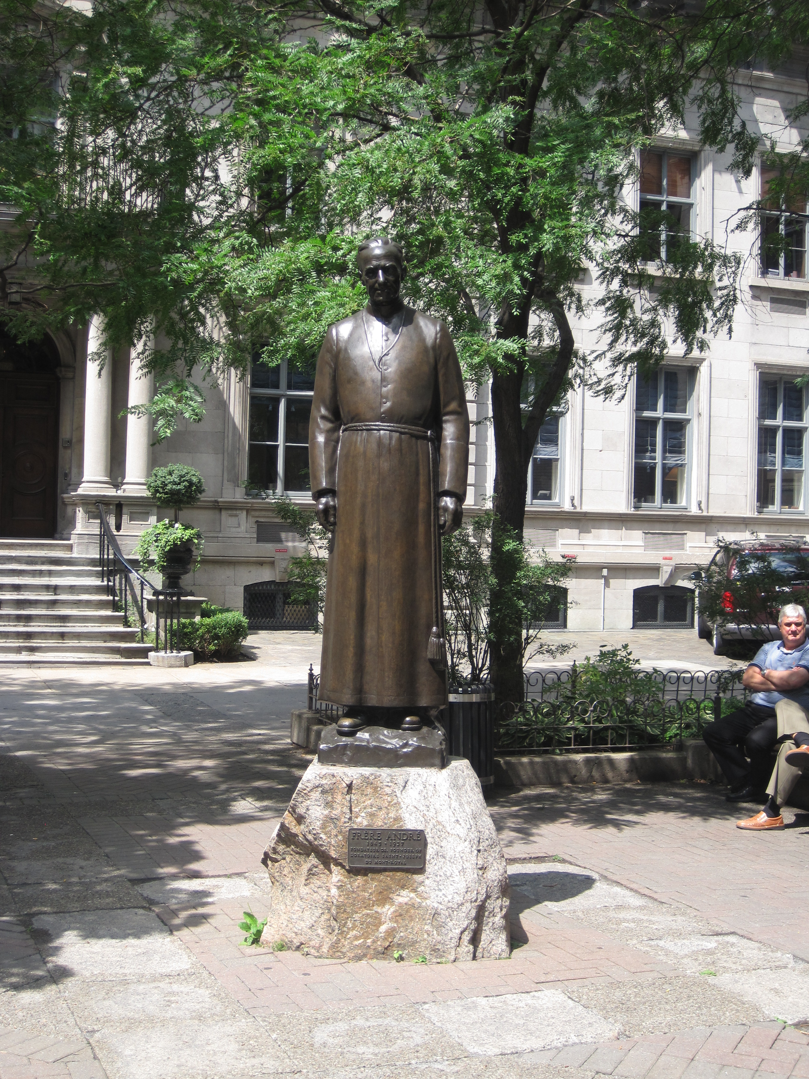 Statue du Frère André, oeuvre d'Émile Brunet (Place du Frère-André à Montréal)